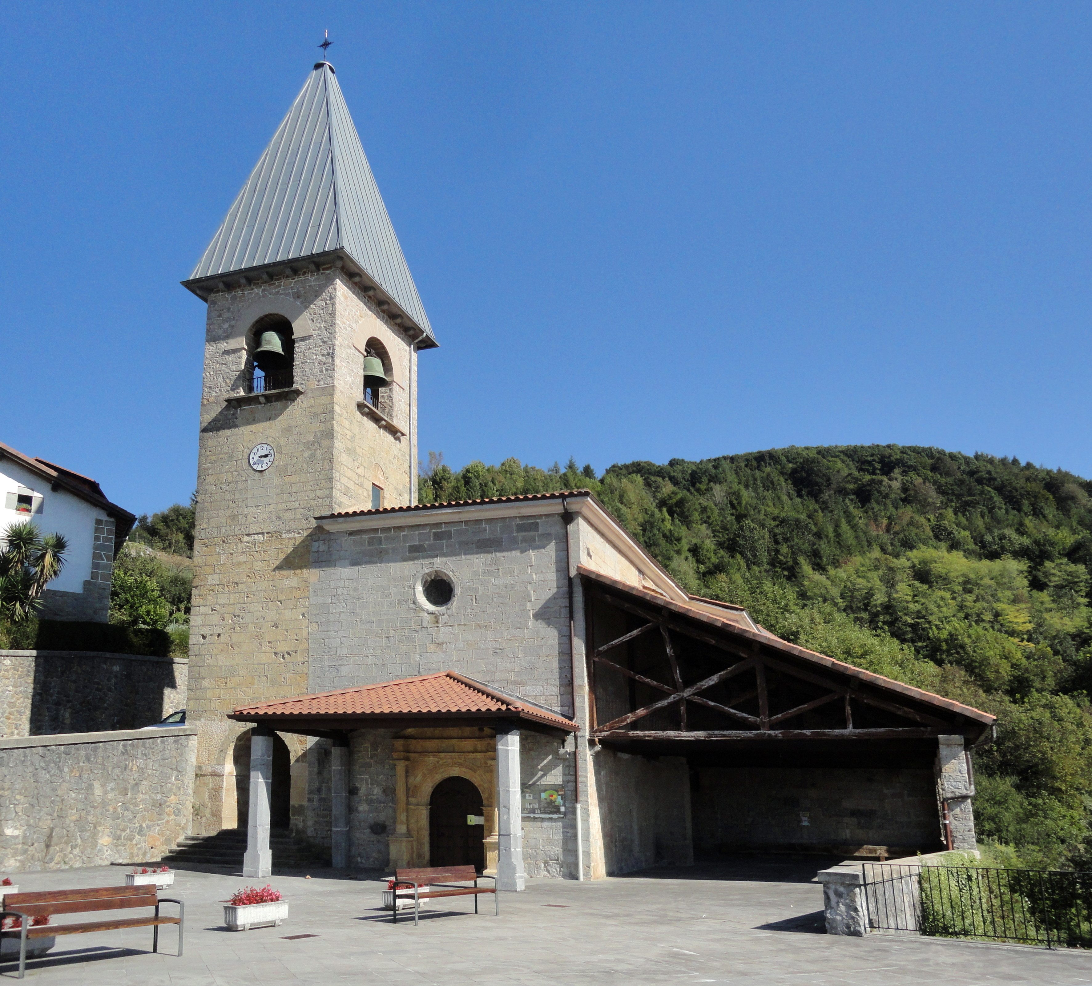 San Juan Bautista - Belauntza